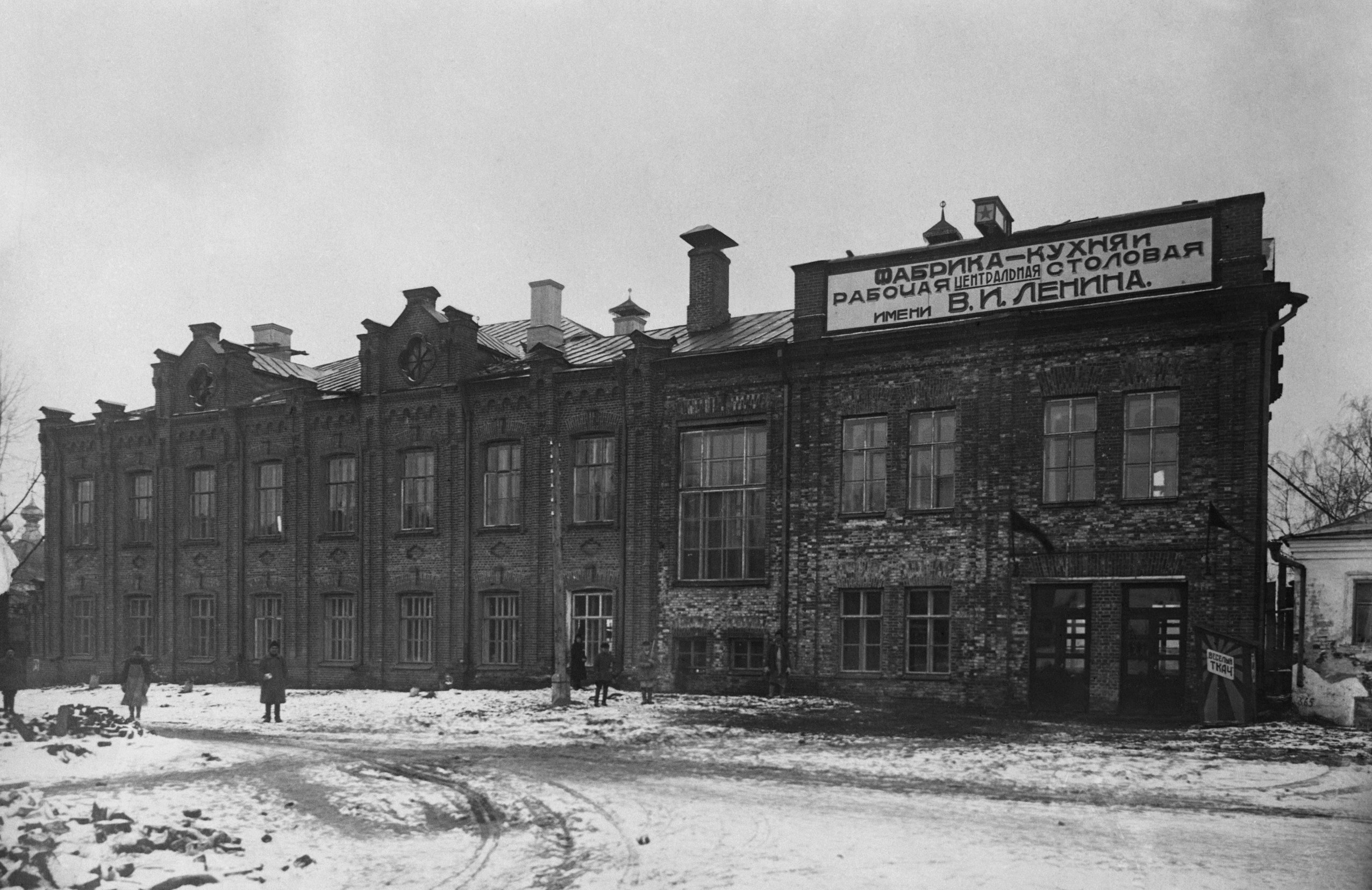 Первая в СССР механизированная фабрика-кухня имени В. И. Ленина «Нарпит» в Иваново-Вознесенске (Иваново)